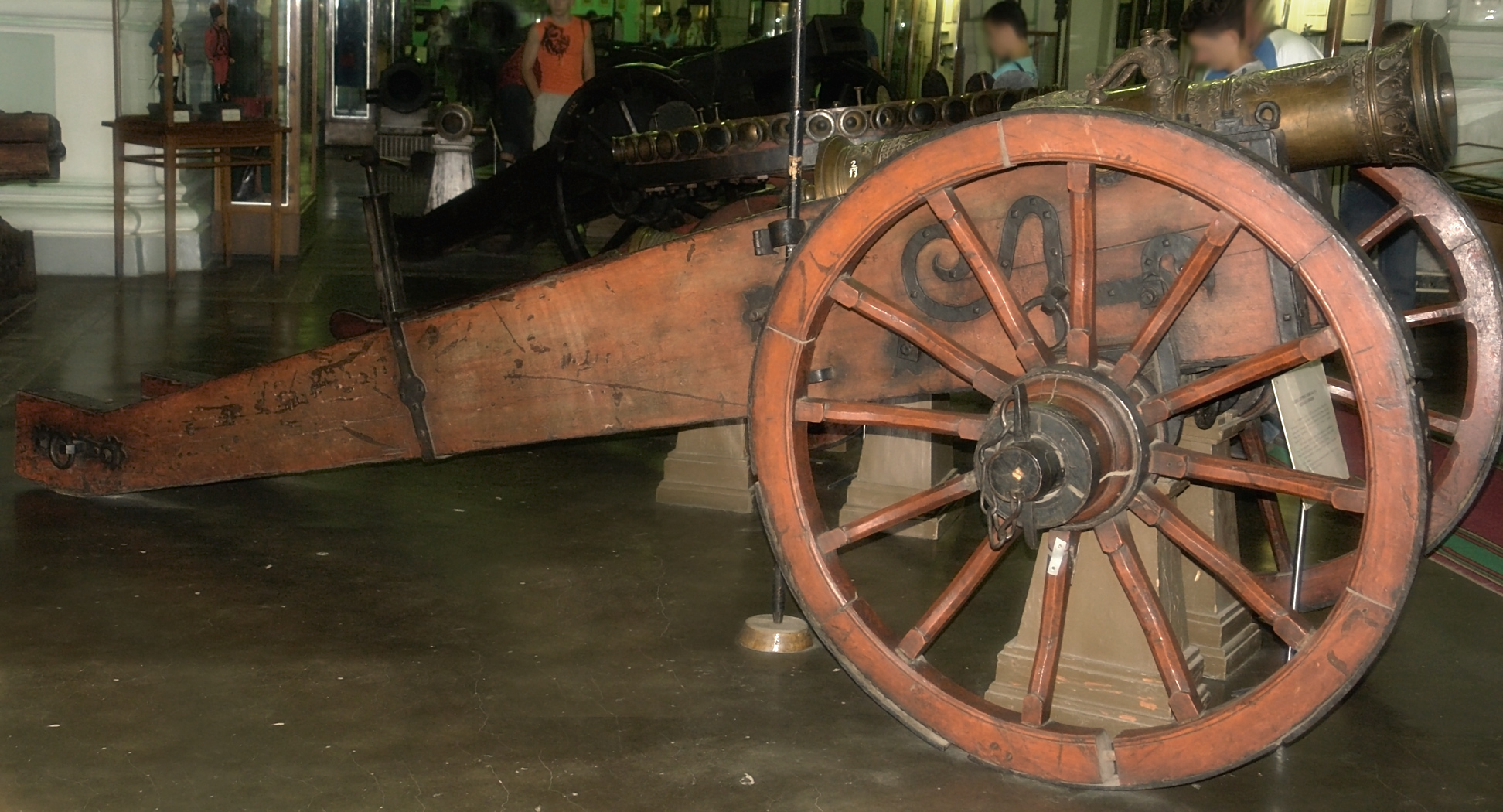 Полевая "секретная" гаубица образца 1753 года системы П. И. Шувалова. Ствол бронзовый. Калибр 95х207 мм. Длина 162 см. Масса 491 кг. Изготовлена в 1753 году в Москве. После успешных испытаний гаубицы сенат приказал "хранить в арсенале за печатью, дабы имеющаяся в ней инвенция, кроме наружности, никому открыта быть не могла". Дальность стрельбы 532 м. Идея создания гаубицы, специально предназначенной для стельбы картельчю была предложена П. И. Шуваловым. Разработку нового орудия осуществлили майор Мусин-Пушкин и пушечный мастер Михаил Степанов.